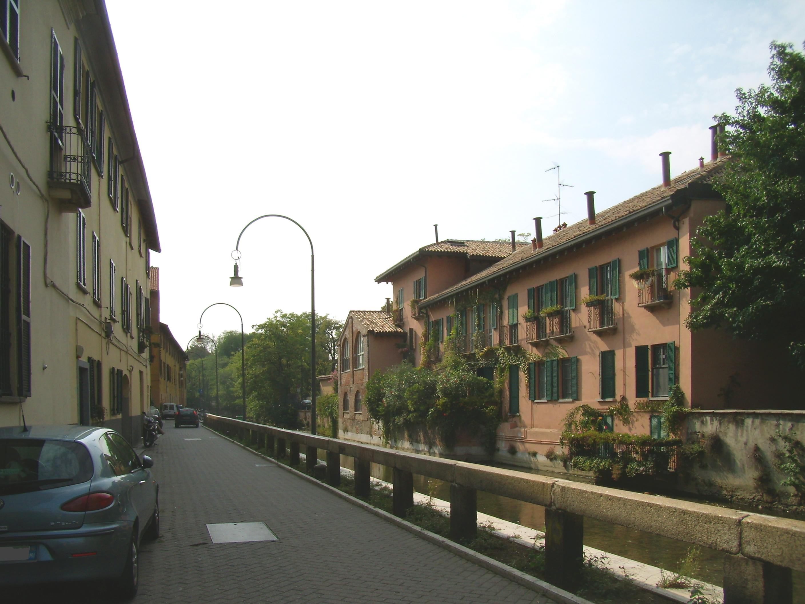 Via Tofane e Naviglio Martesana a Milano (quart. Gorla)